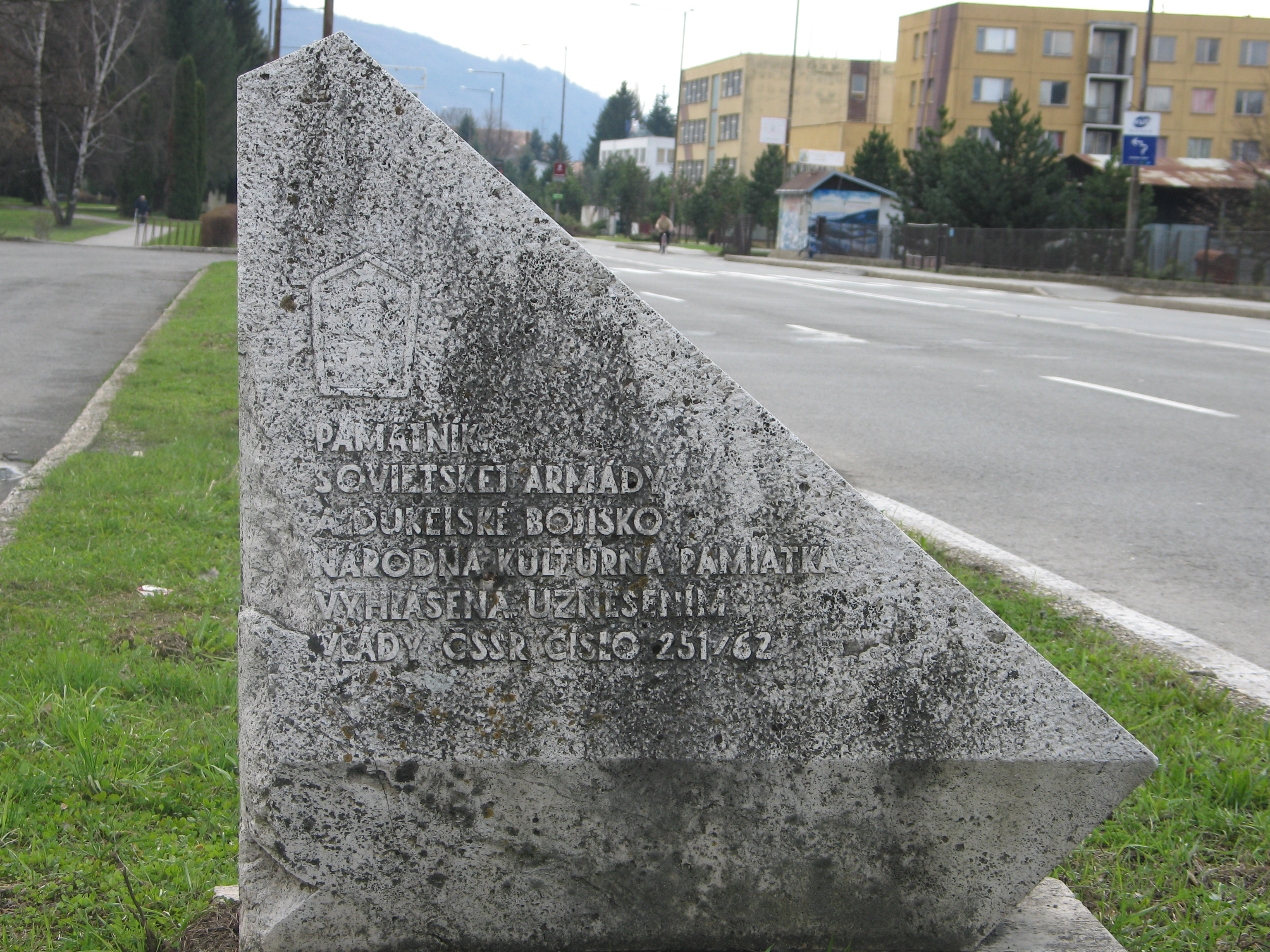 Informačný kameň o pamätníku Sovietskej armády